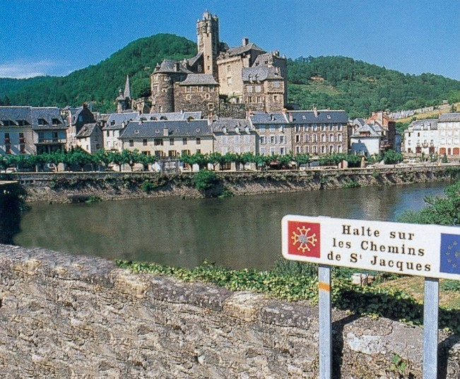 Date du cliché : septembe 2001 - Estaing (Aveyron).